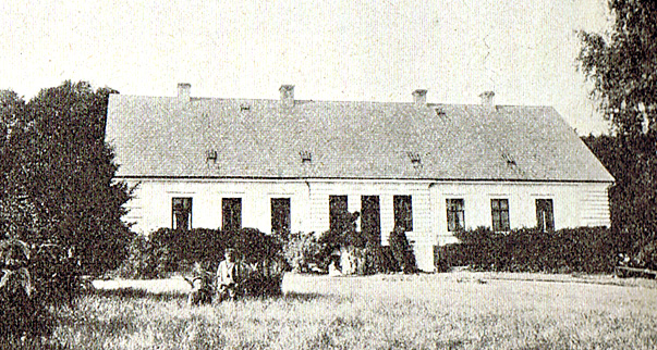 Søholm er en gammel hovedgård, som allerede nævnes i 1443. Søholm er nu en avlsgård under Krengerup Gods. Gården ligger i Køng Sogn, Båg Herred, Glamsbjerg Kommune. Hovedbygningen er opført i 1855-1858.